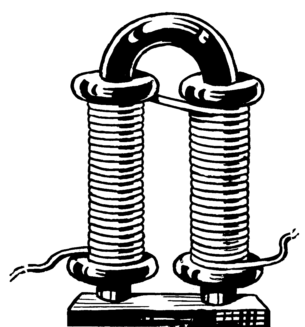 Electromagnet